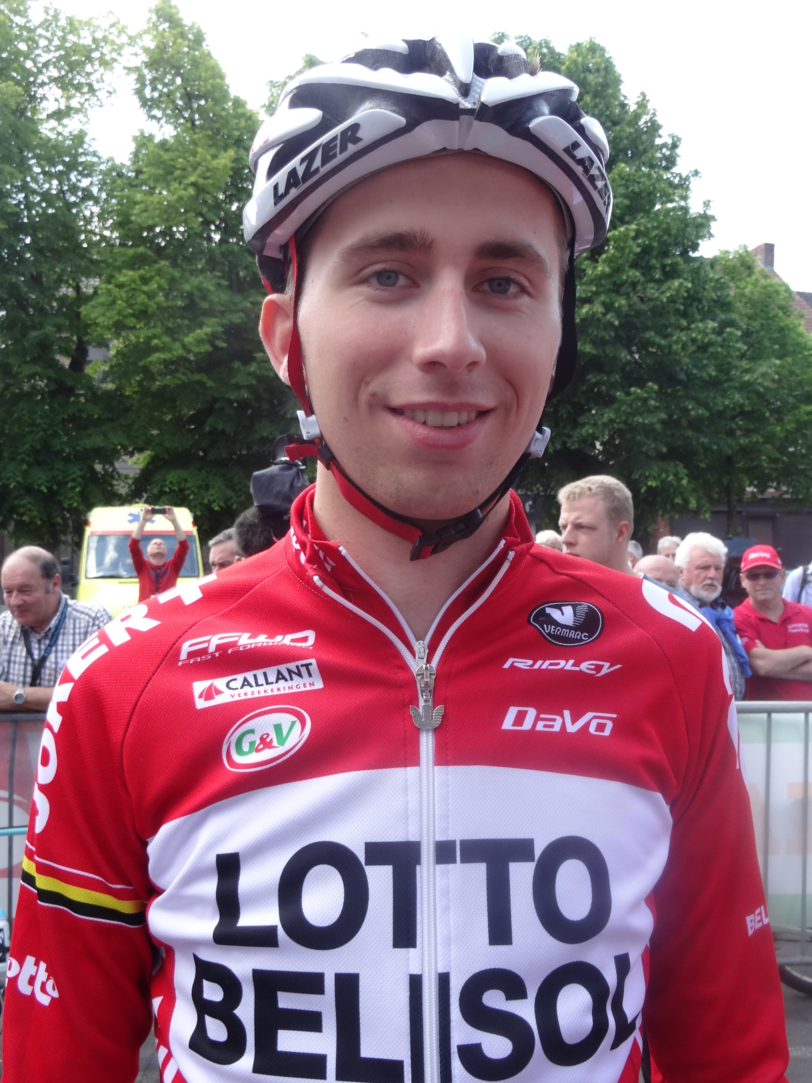 Reportage réalisé le samedi 17 mai à l'occasion du départ du Grand Prix Criquielion 2014 à Boussu, Belgique.